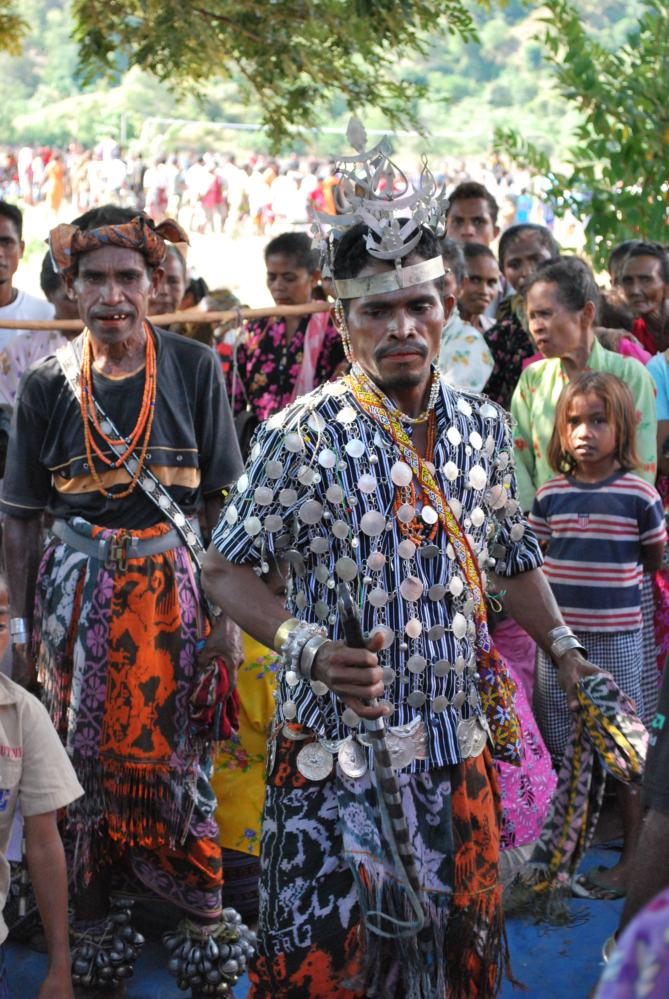 Ornament made of Silver, gold, old coins used for dancing the traditional dance Bso'ot in Oekum, Taiboco, district of Oecusse